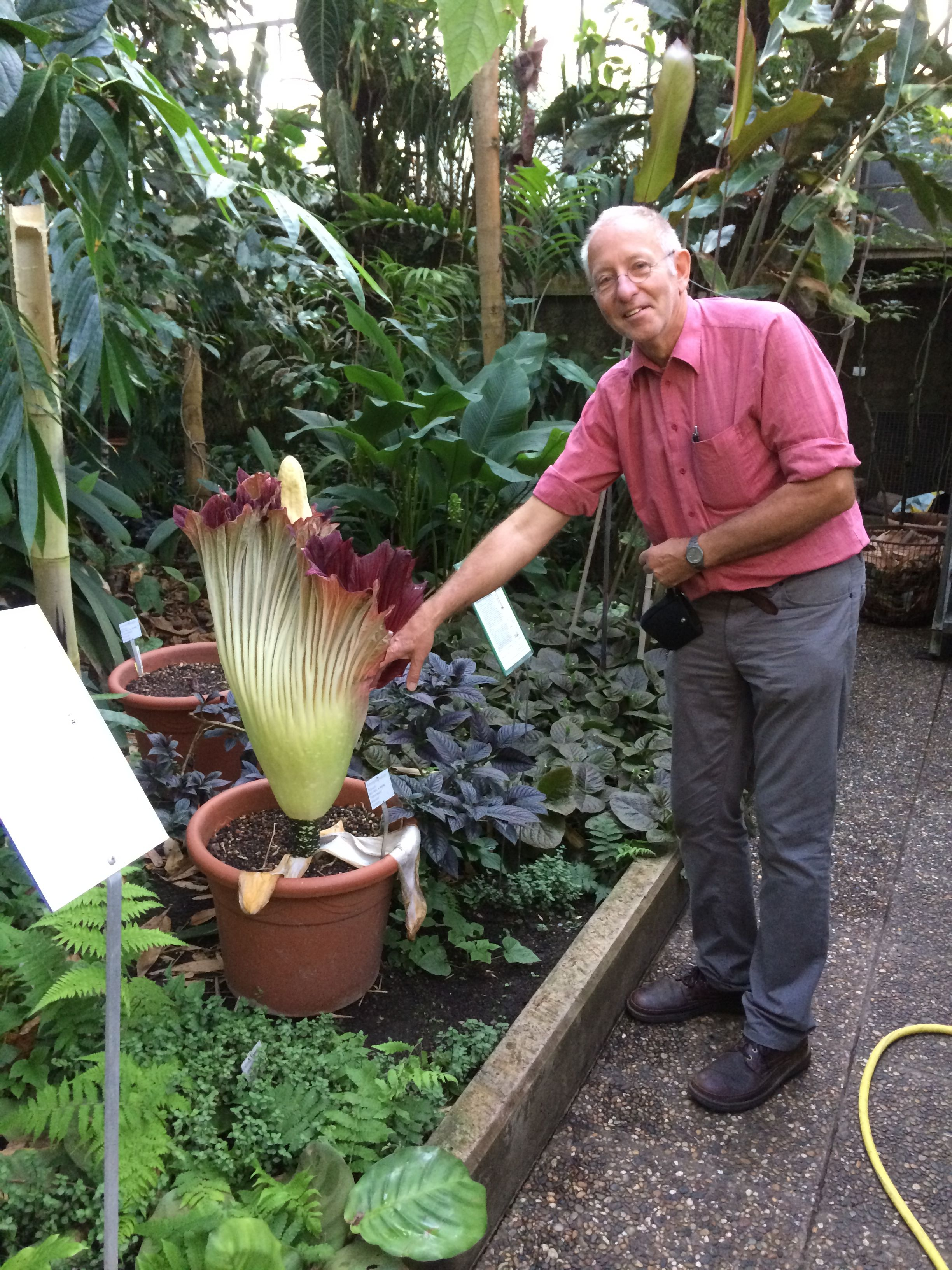 Der Leiter des Botanischen Gartens Darmstadt, Stefan Schneckenburger, mit blühender Amorphophallus